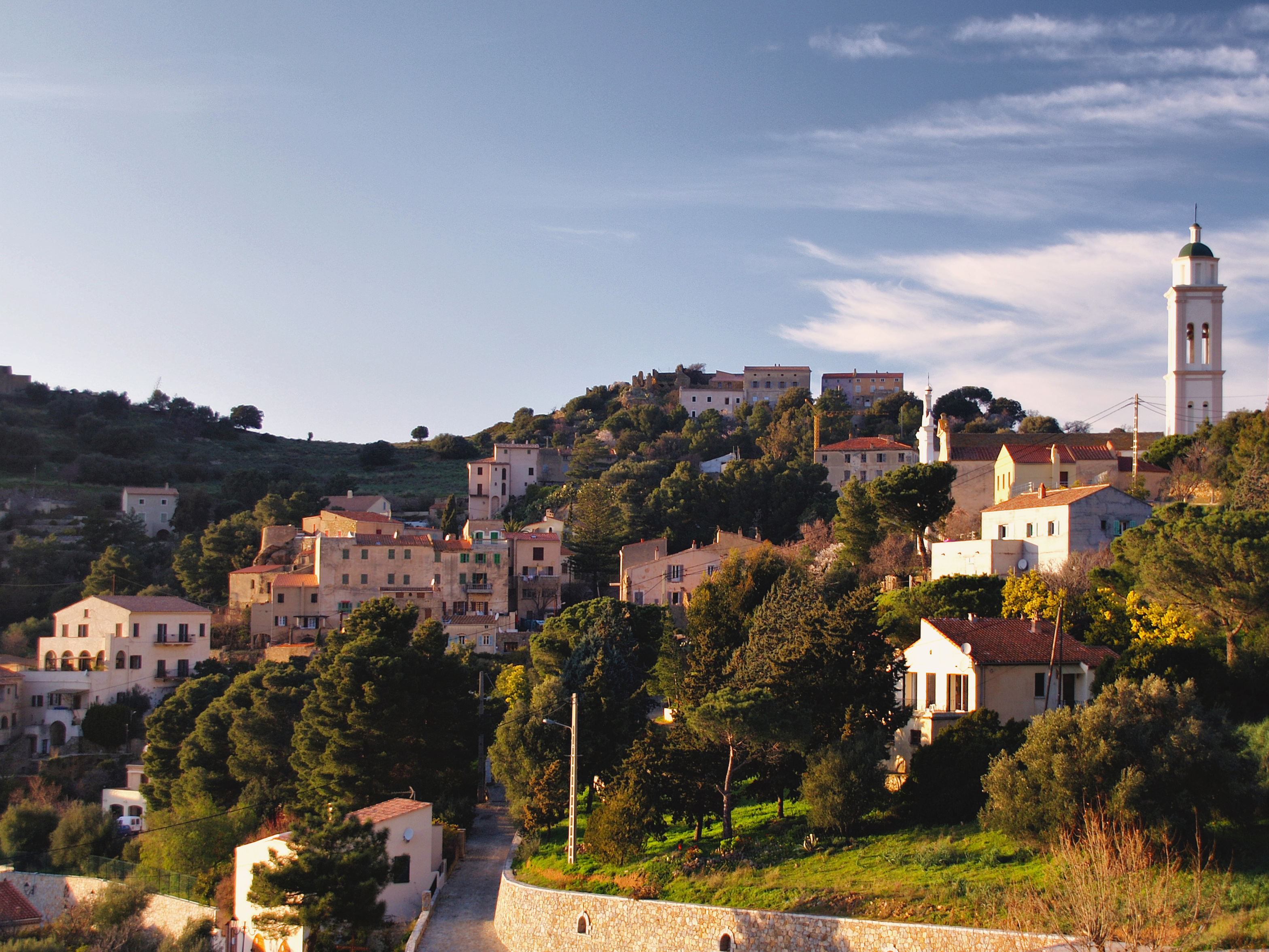 Corbara - Le village et l'église